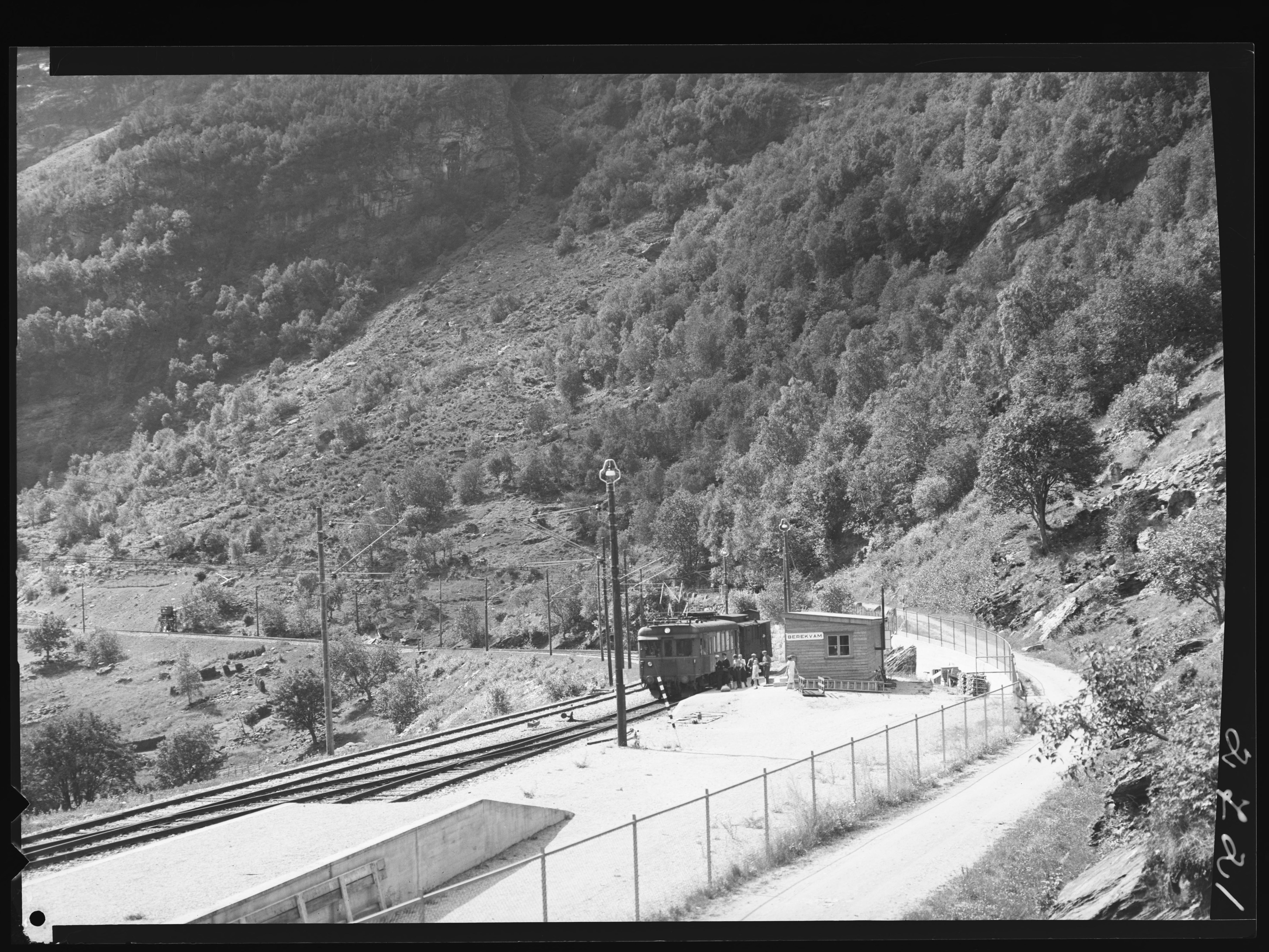 Bildet er hentet fra Nasjonalbibliotekets bildesamling. Anmerkninger til bildet var: Fotograf ukjent. Berekvam,Flåmsdalen, Aurland, Sogn og Fjordane